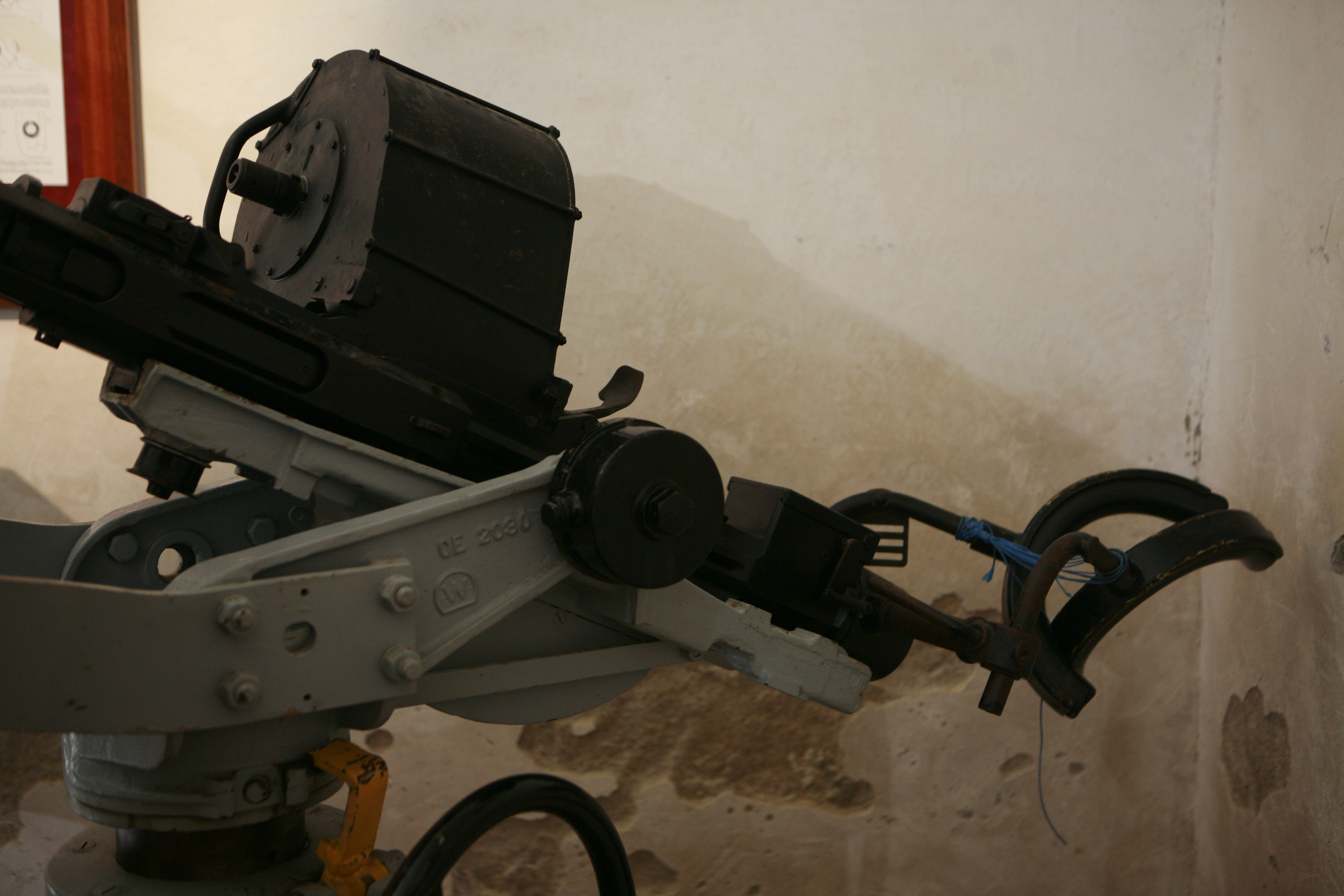 Oerlikon 20 mm cannon